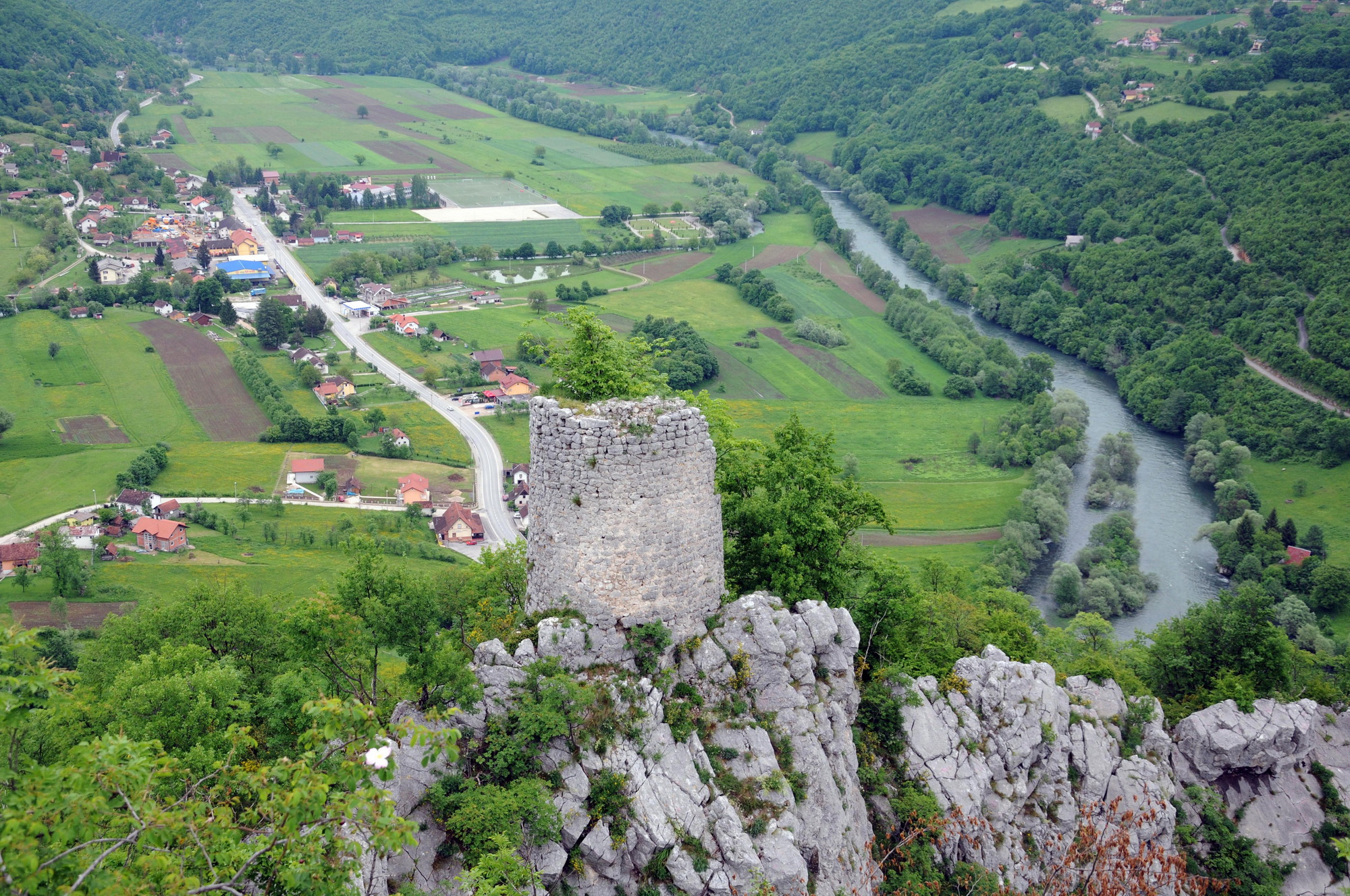 stari grad greben ostatci kule i pogled na krupu na vrbasu This image was uploaded as part of Trace of Soul 2015.